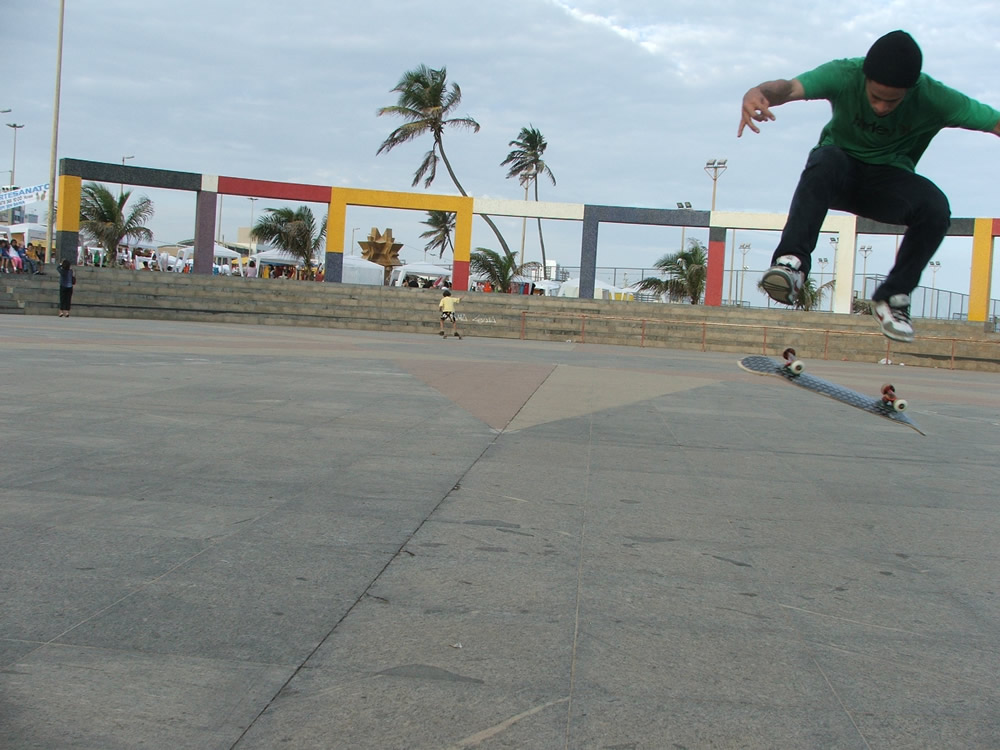 Um cara fazendo manobras com o skate no Parque Jardim dos Namorados, Salvador, Bahia, Brasil.